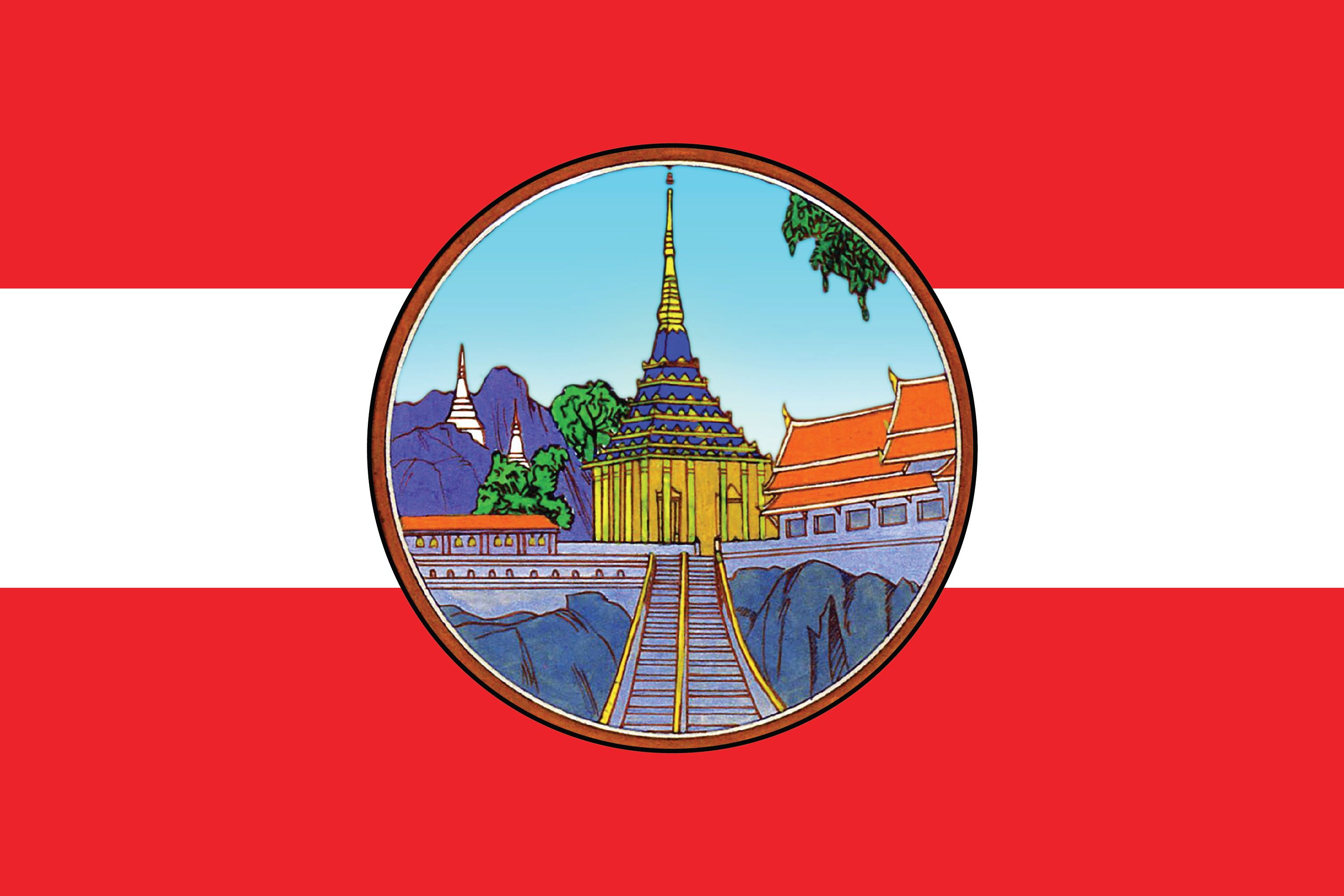 ปรับปรุงตราประจำจังหวัด